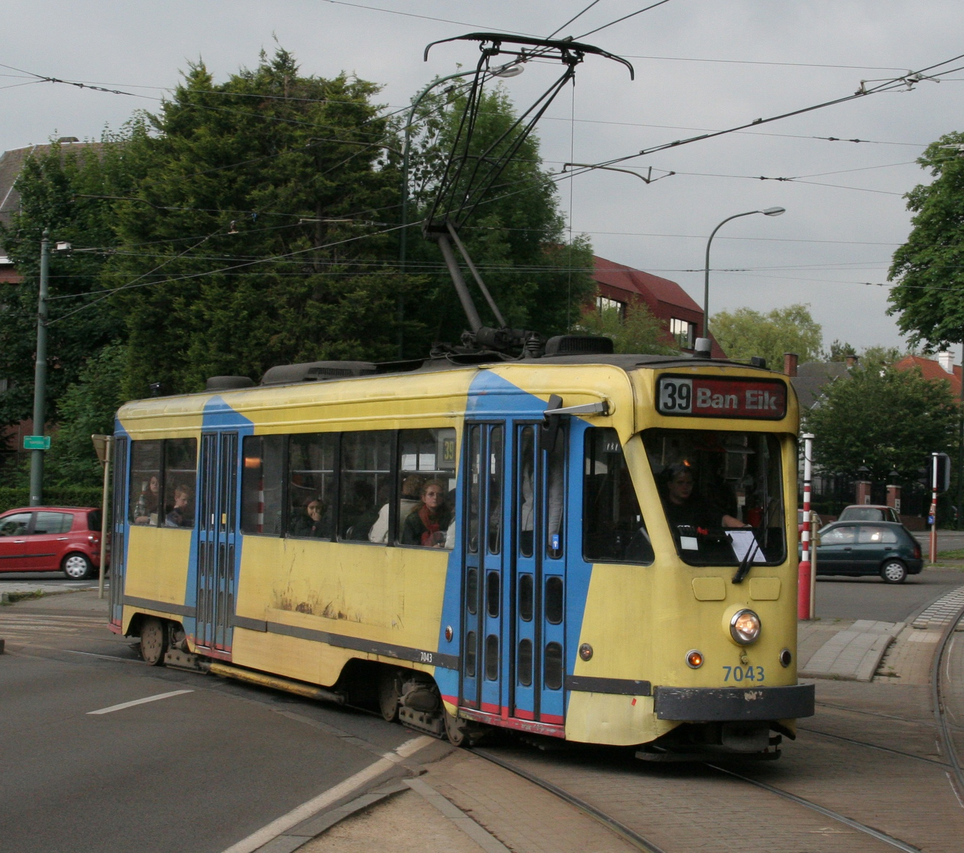 Moderne kleuren MIVB PCC car